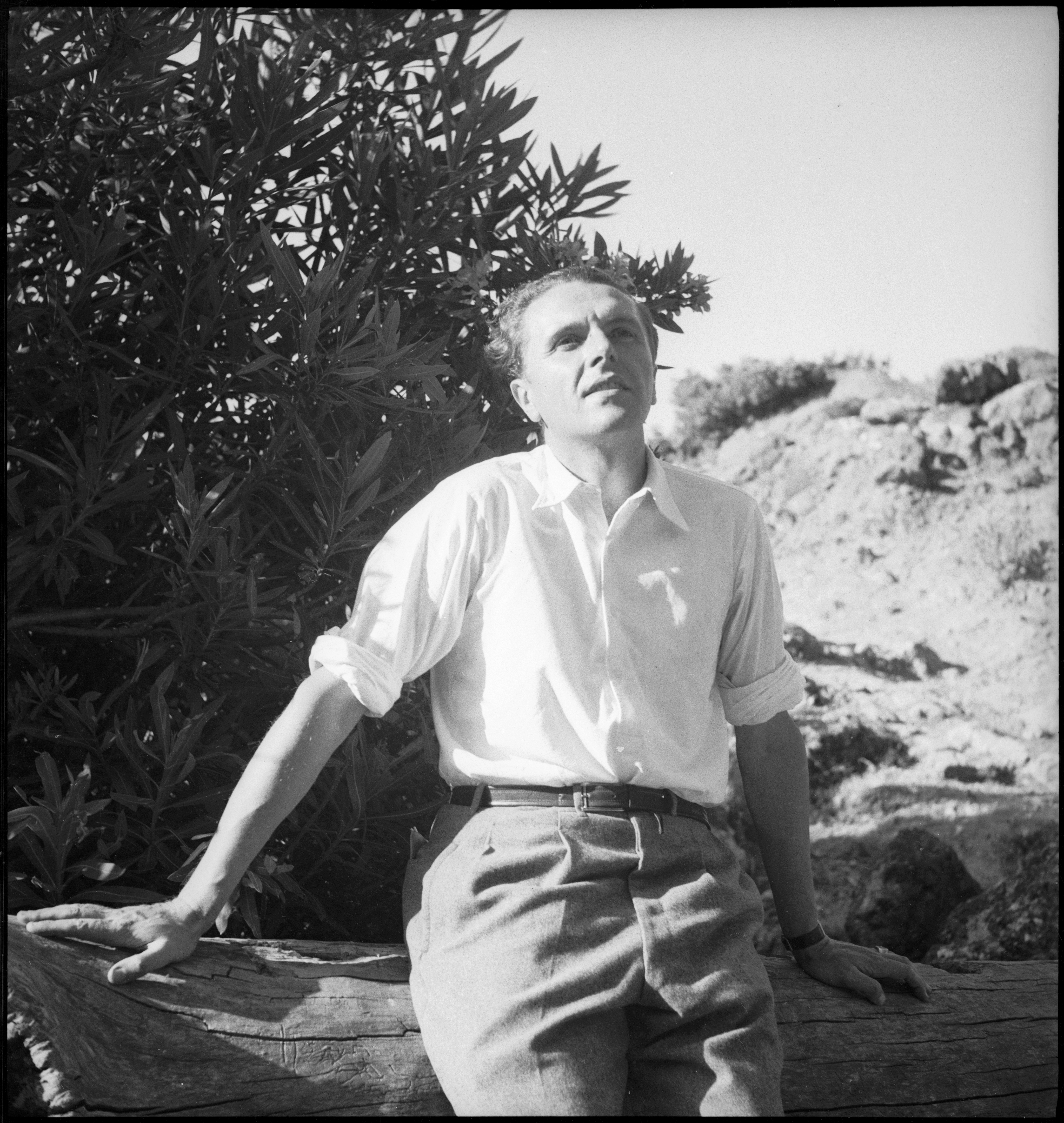 Französisch-Marokko, Rabat: Claude Clarac; Claude Clarac an einen Baumstrunk angelehnt in der Kasbah Oudayah